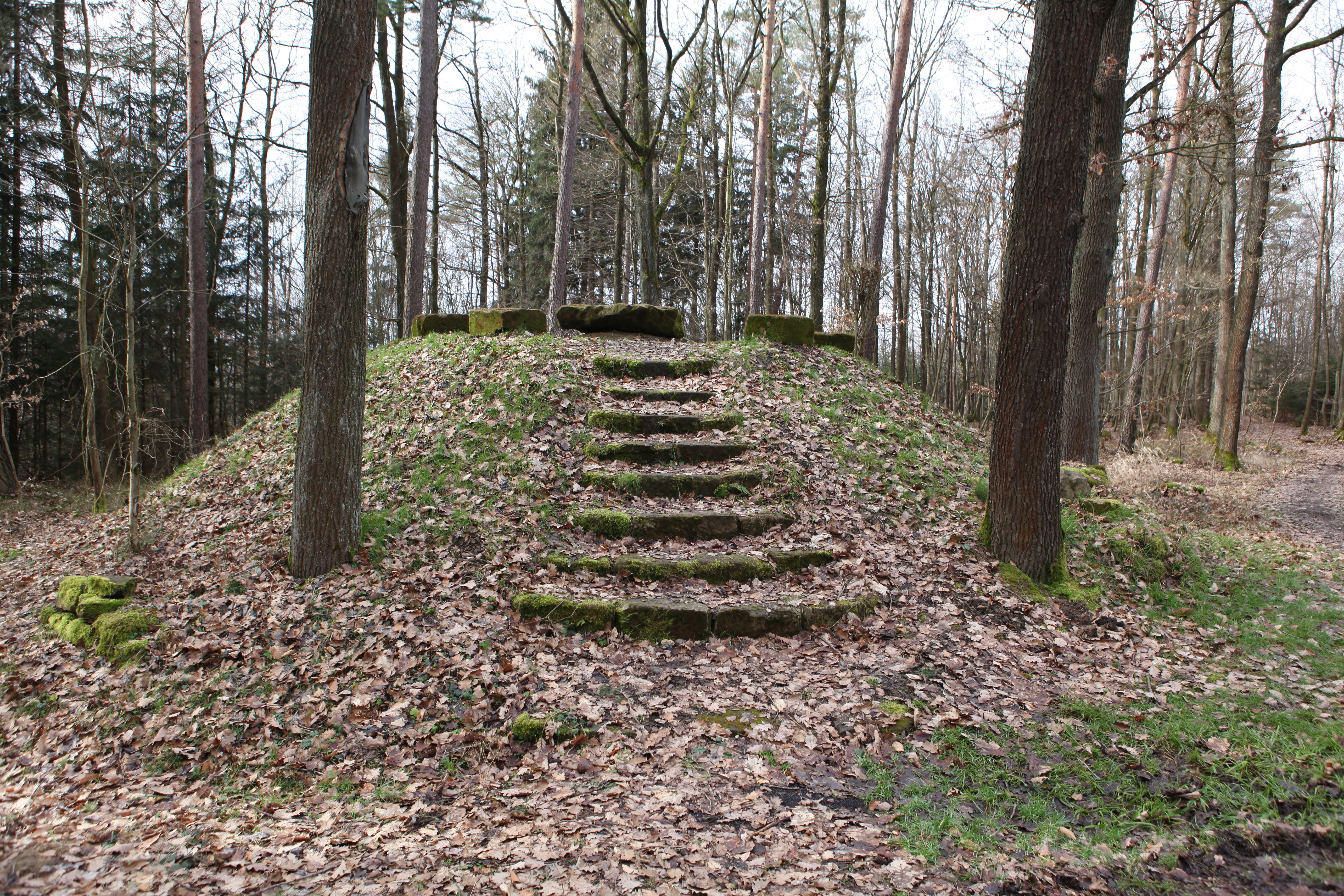 Nachbau Gerichtshügel am Tiereller bei Watzendorf, Lkr. Coburg